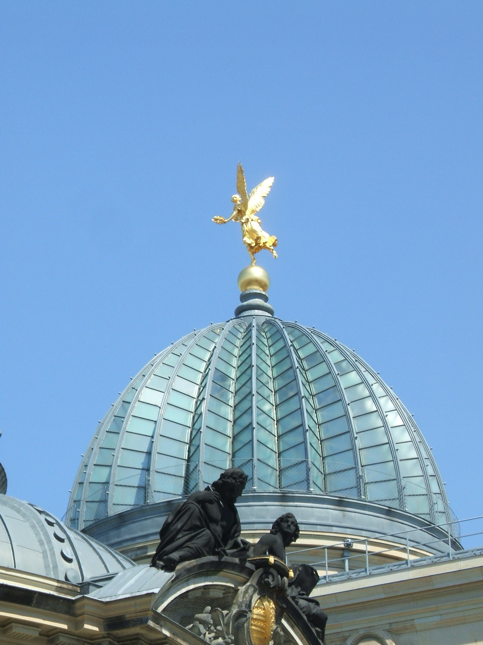 „Zitronenpresse“ - Kuppel der Hochschule der Bildenden Künste.